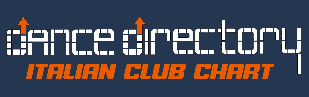 Italian Club Chart